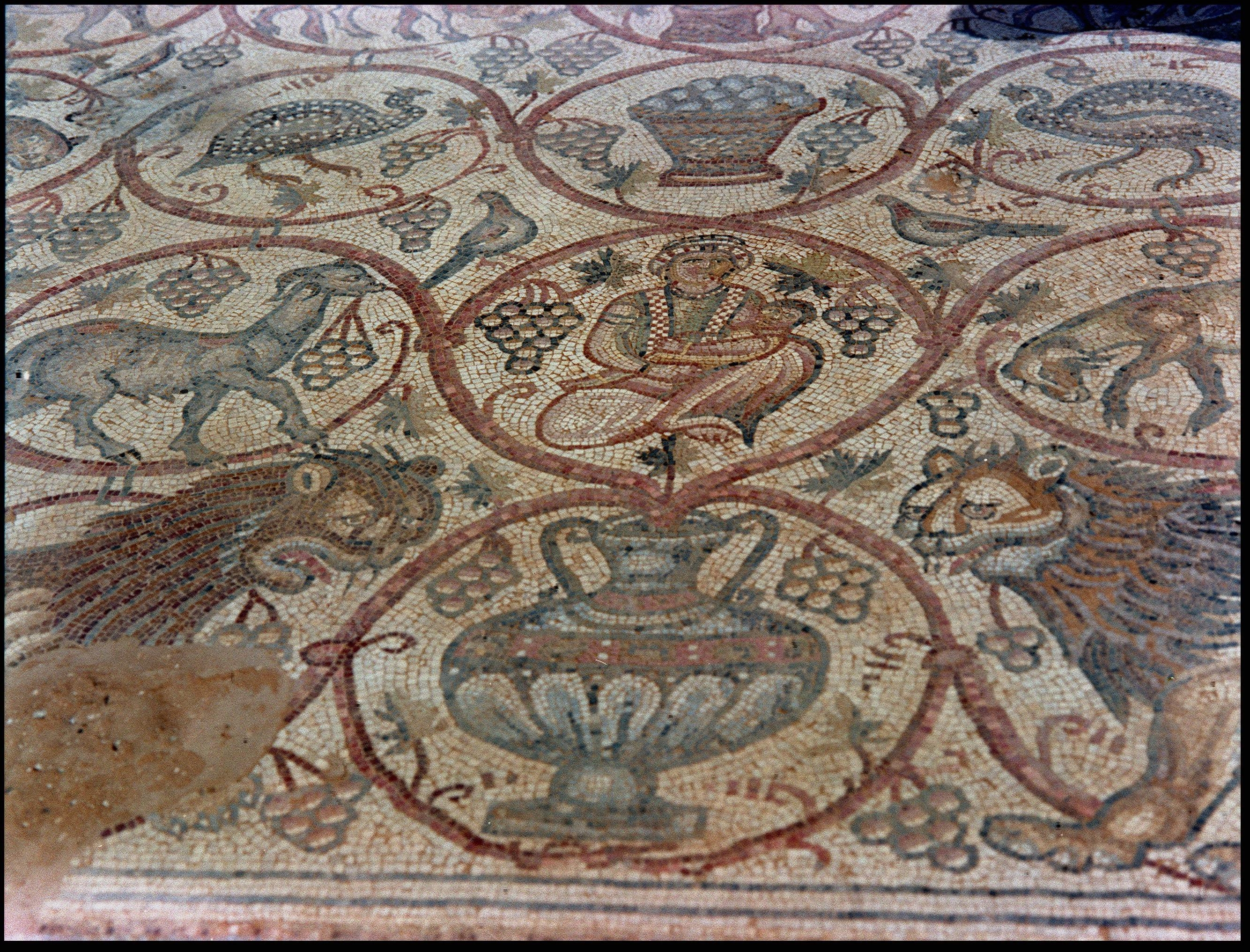 Part of the Be'er Shama mosaic. עתיקות וארכיאולוגיה בבאר שמע ליד צאלים. בצילום, חלק מריצפת המוזאיקה שהתגלתה בבאר שמה, ליד צאלים. Photo: ALPERT NATHAN, 09/11/1990